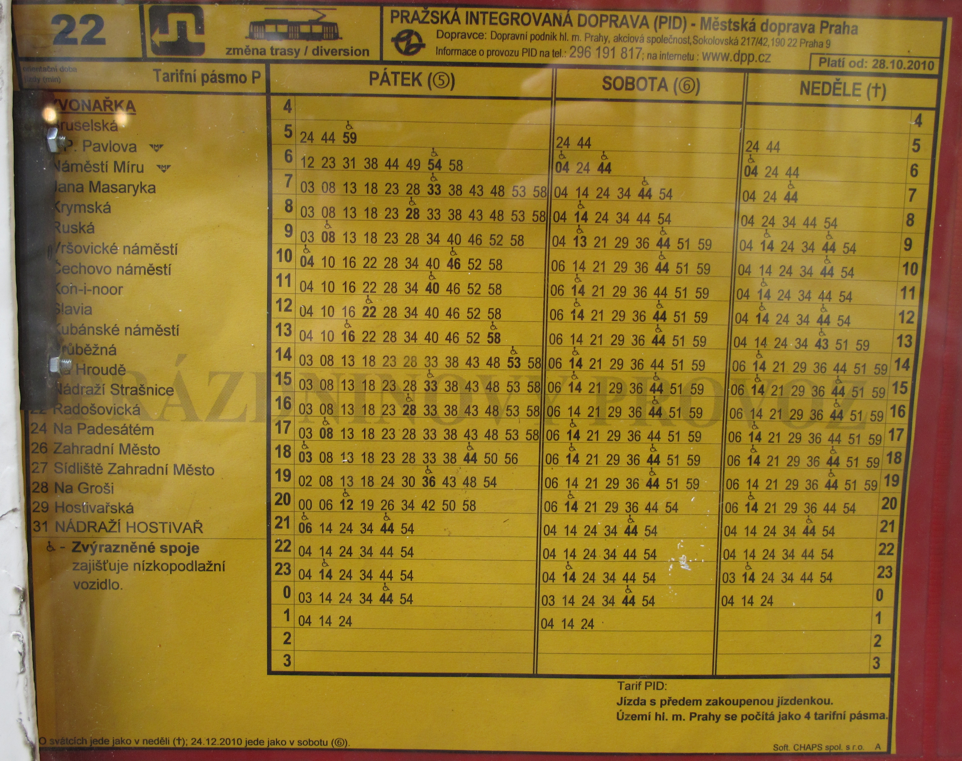 Výluka ve stanici I. P. Pavlova koncem října a začátkem listupadu 2010 a změny s tím související. Praha, Česká republika.